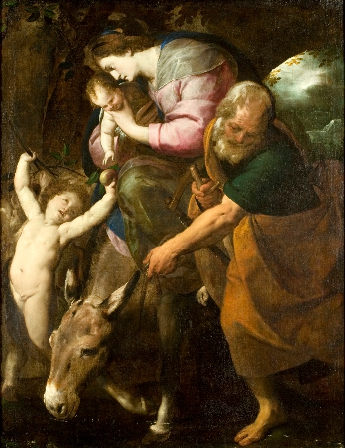 Giovan Battista Crespi detto il Cerano (Romagnano Sesia, 1573 – Milano, 1632) Fuga in Egitto, Bristol (UK), City Art Gallery